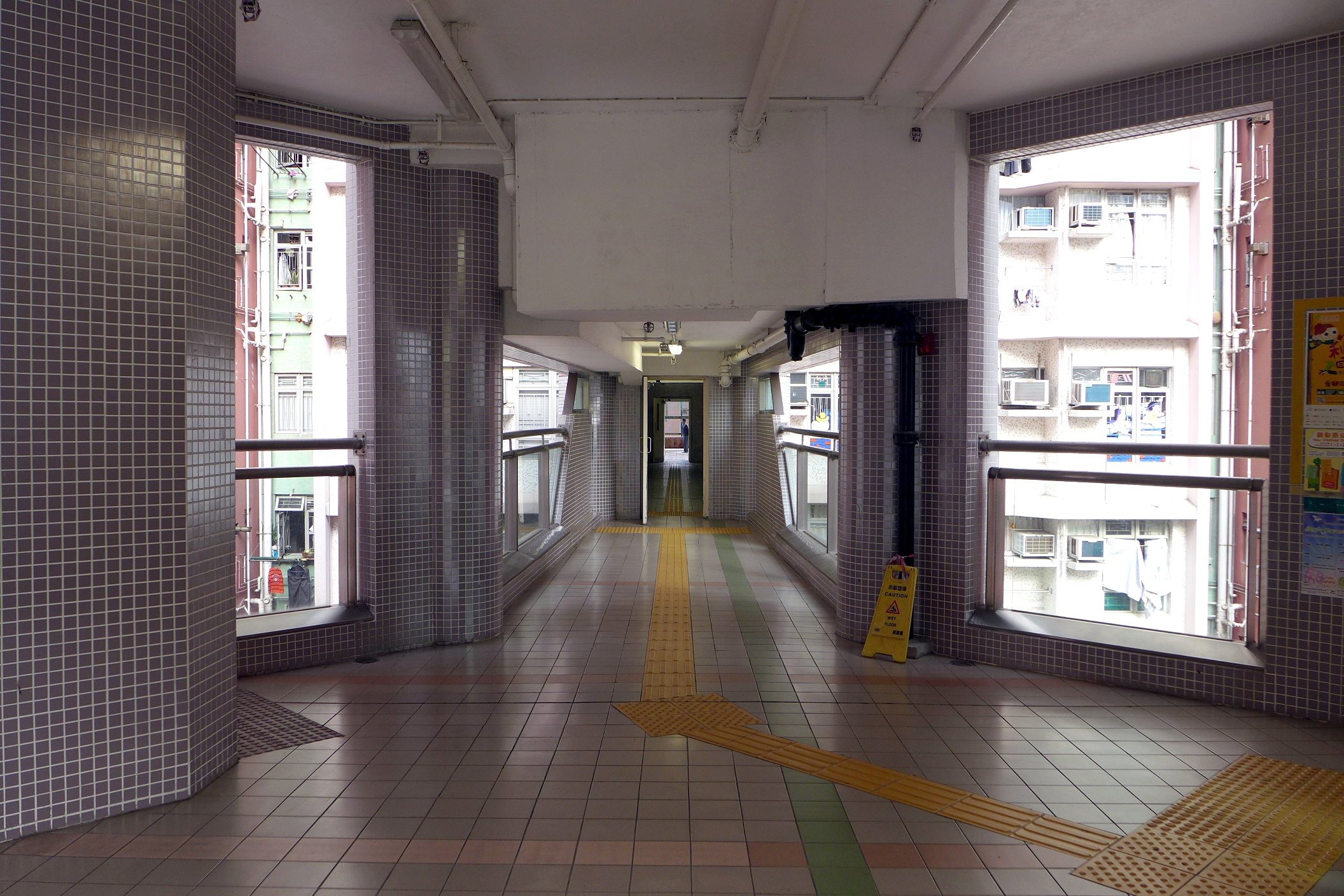 Wah Lai Estate Lift Tower